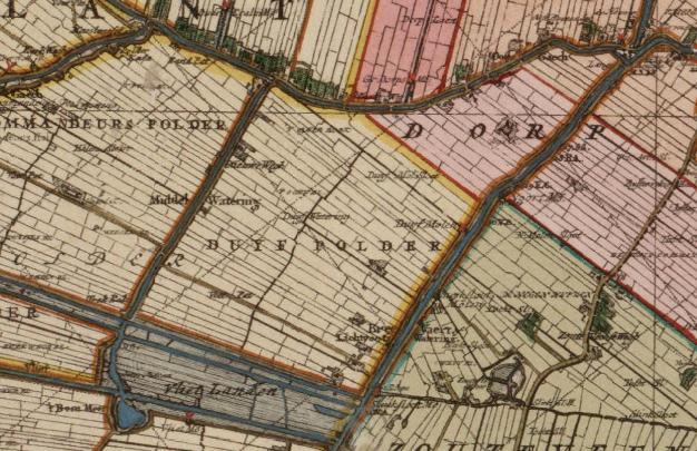 Duifpolder.